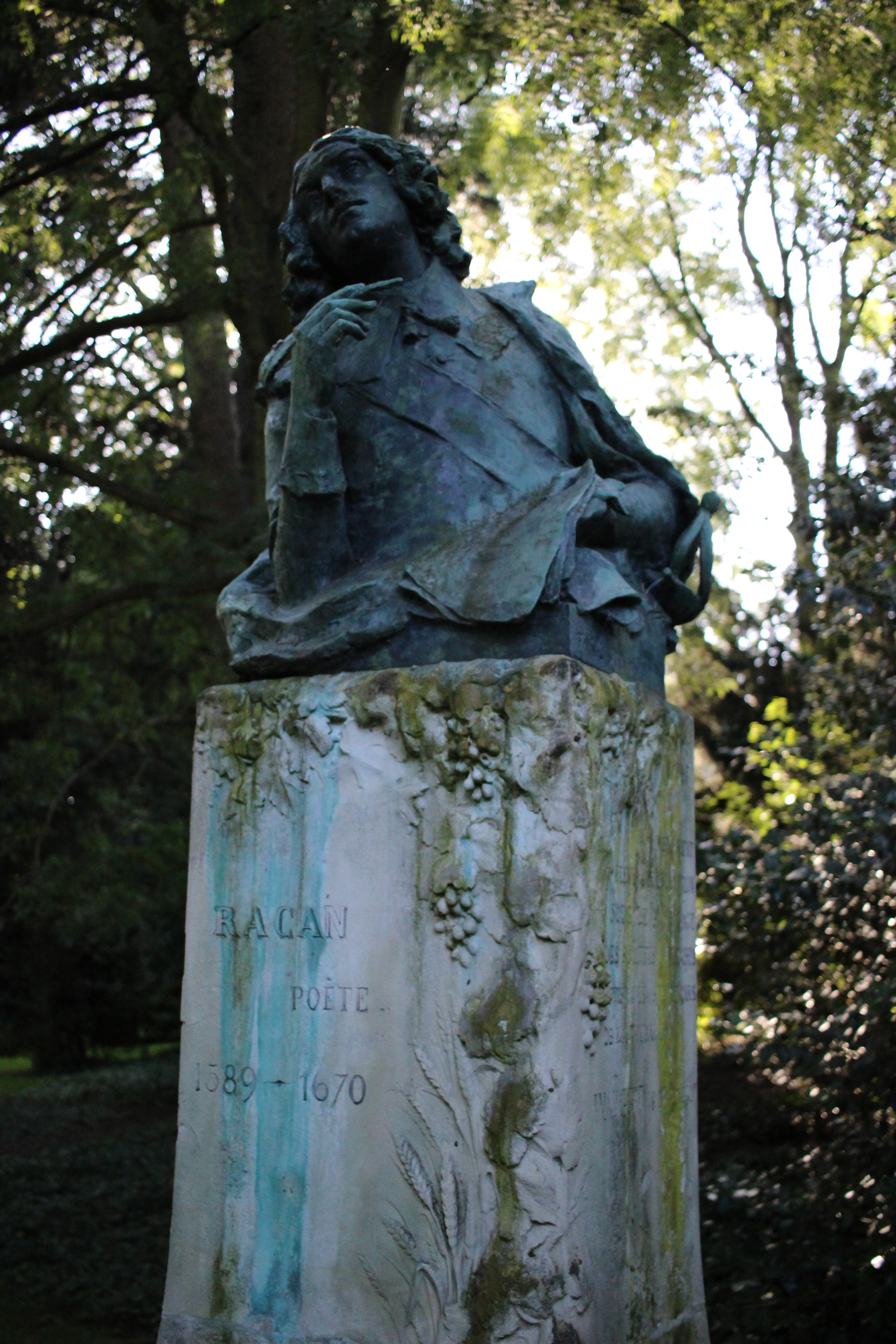 Socle et buste du poète Racan dans le jardin des Prébendes de Tours.